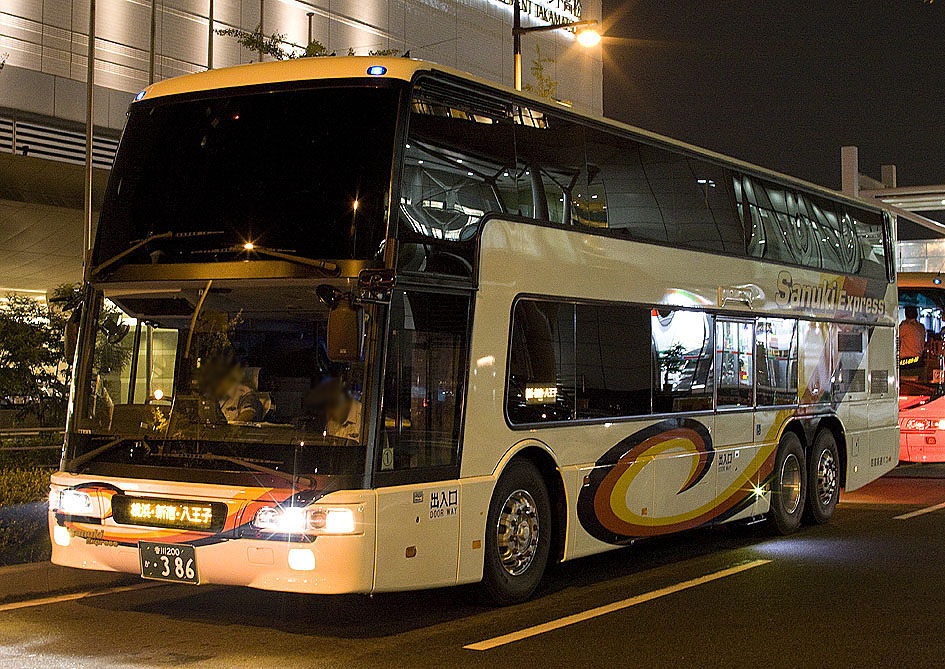 四国高速バス「ハローブリッジ」 BKG-MU66JS エアロキング